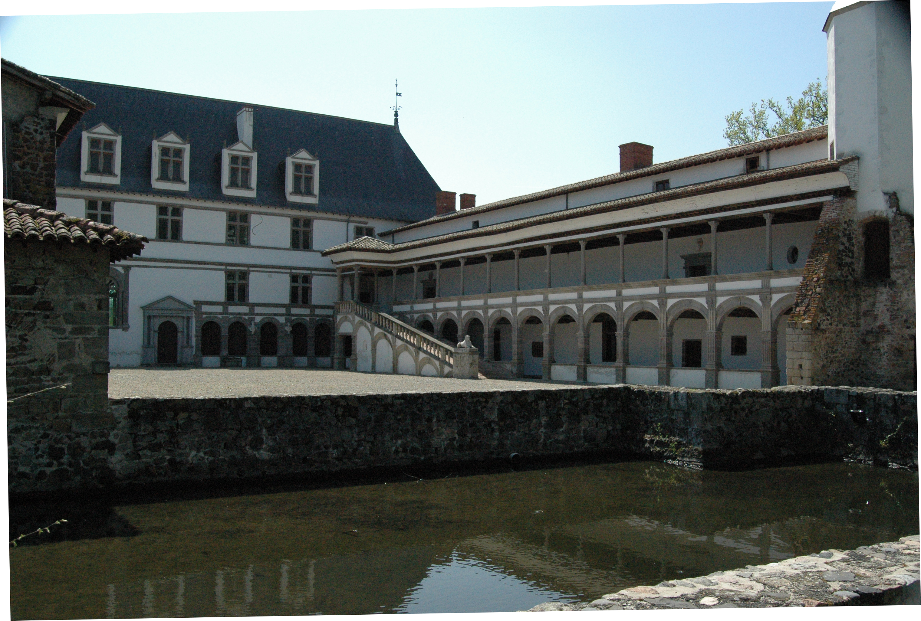 Château de la Bastie d'Urfé - Le Lignon